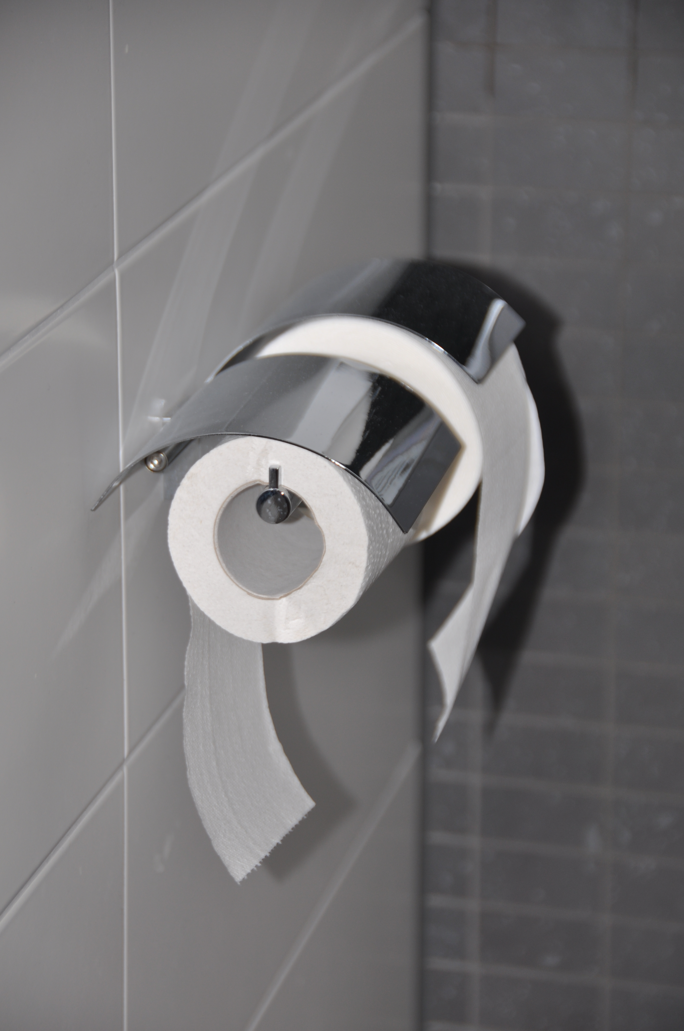 De een wil zijdezacht, de ander schuurpapier, de een wil papier van de muur af, de ander tegen de muur. Oplossing: twee rollen, nooit ruzie.